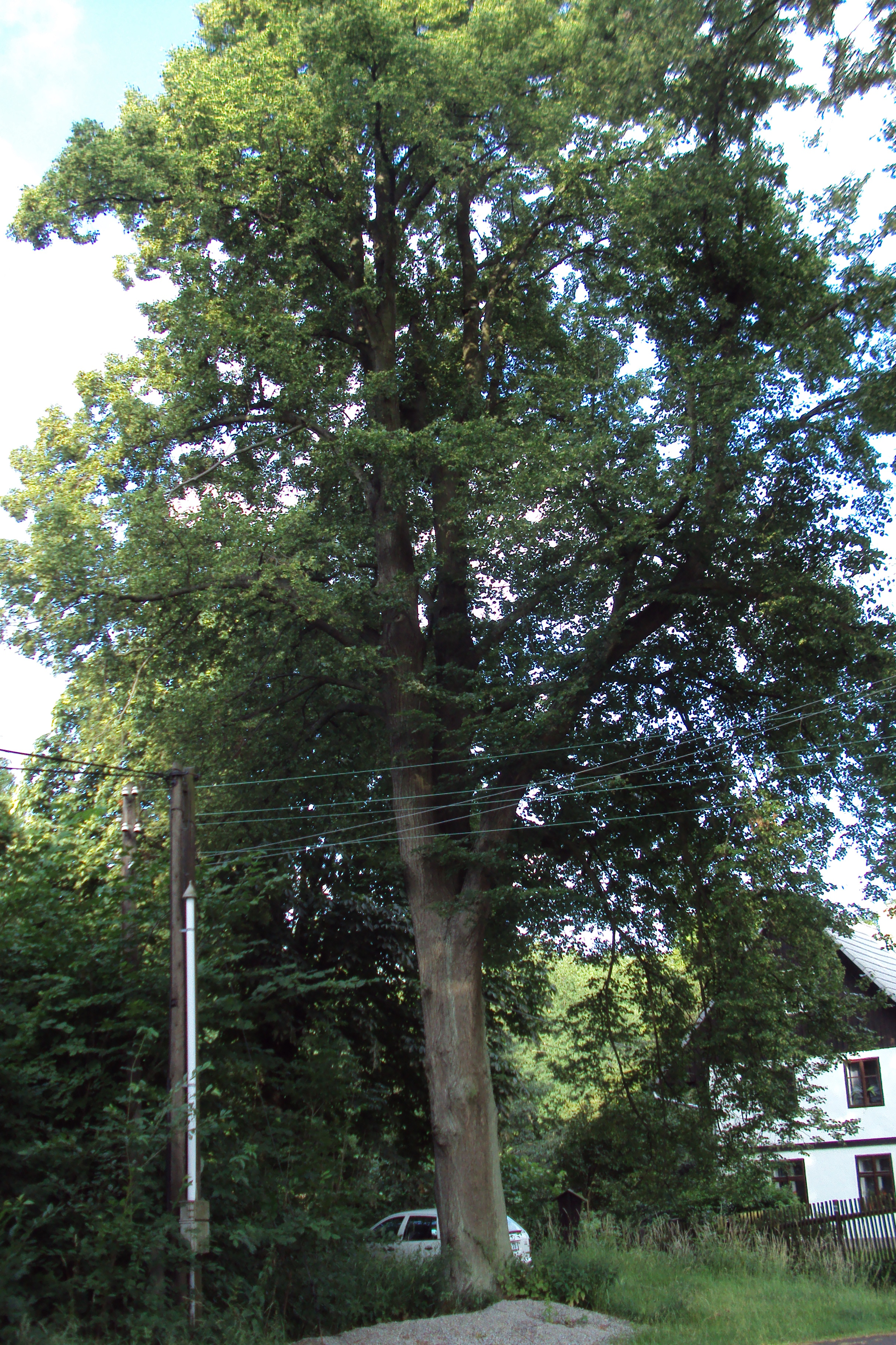 Památná lípa č.1 v osadě Hvězda u Blíževedel